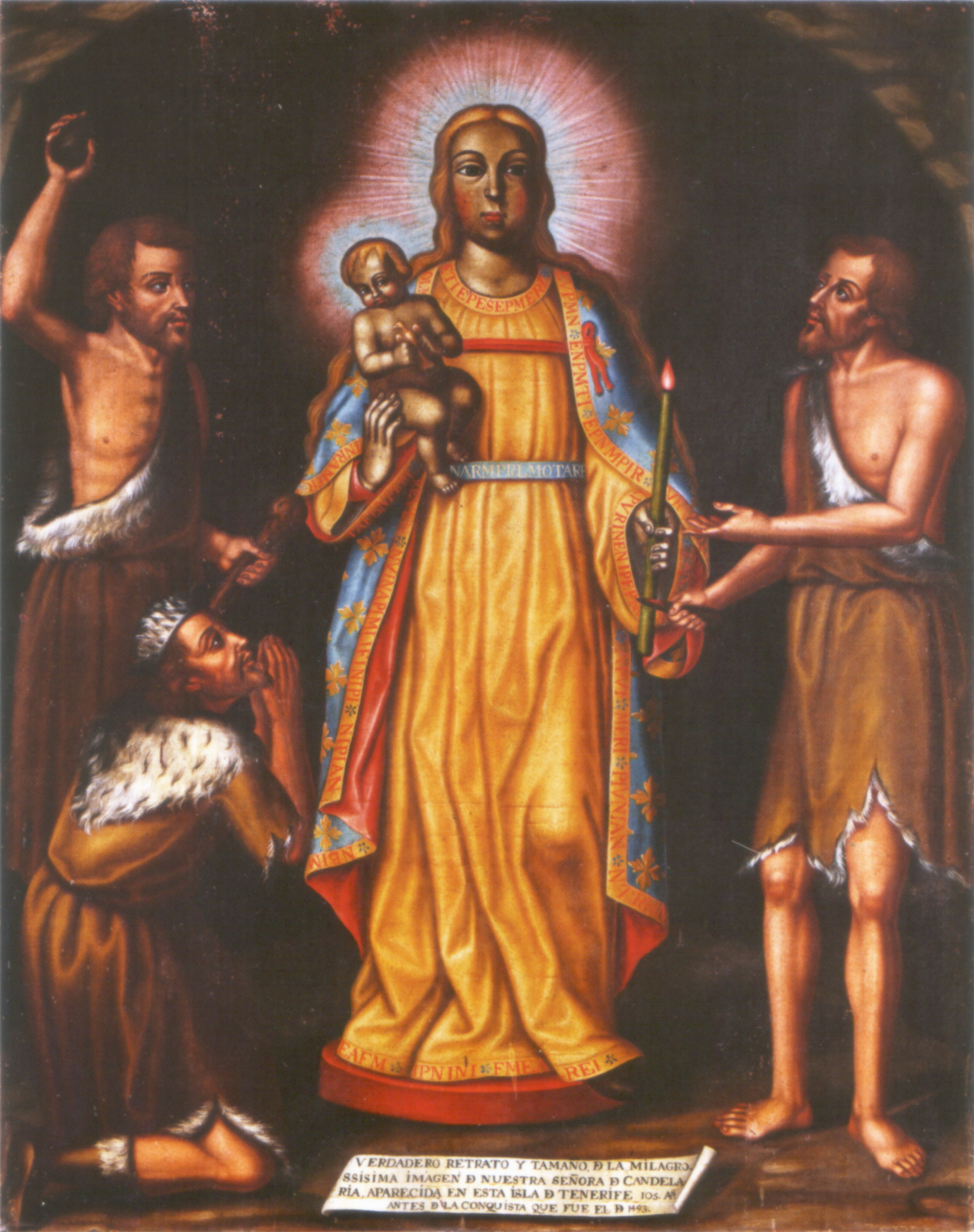 Virgen de Candelaria entre Guanches, quadro del Siglo XVIII, Ermita de las Angustias, Icod de los Vinos, Tenerife, Santa Cruz de Tenerife, España